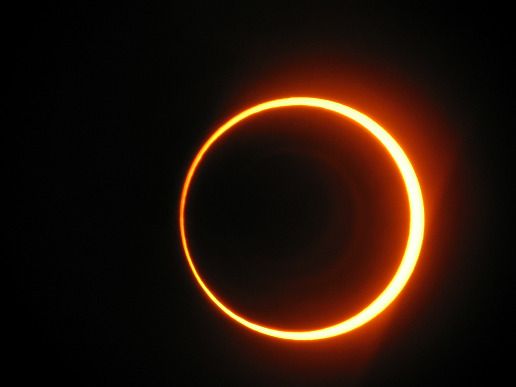 Eclipse Anular